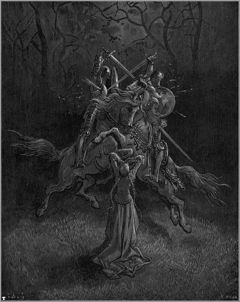 illustration of Ludovico Ariosto’s “Orlando Furioso”.